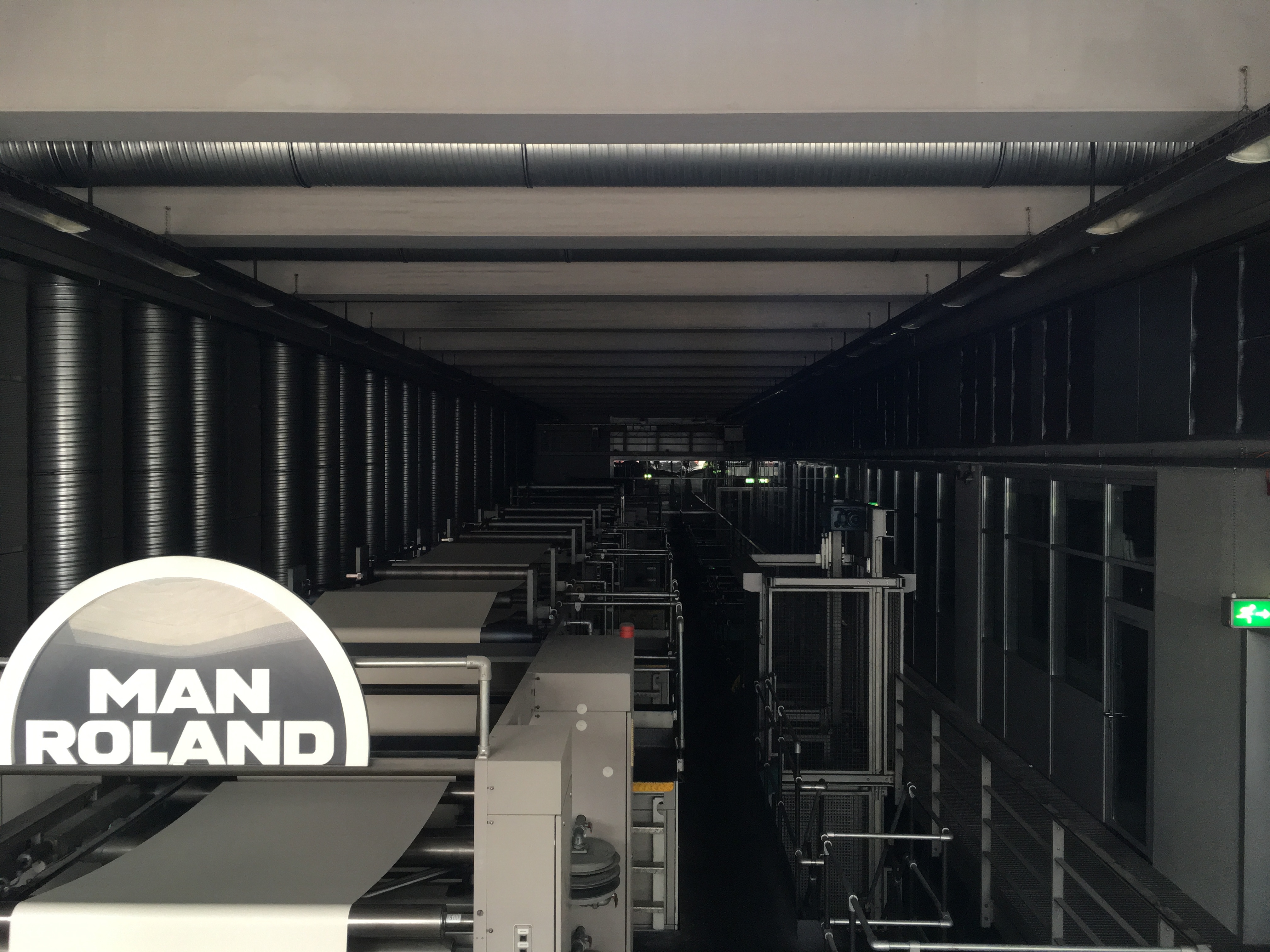 Druckpressen der Nürnberger Nachrichten und der Nürnberger Zeitung